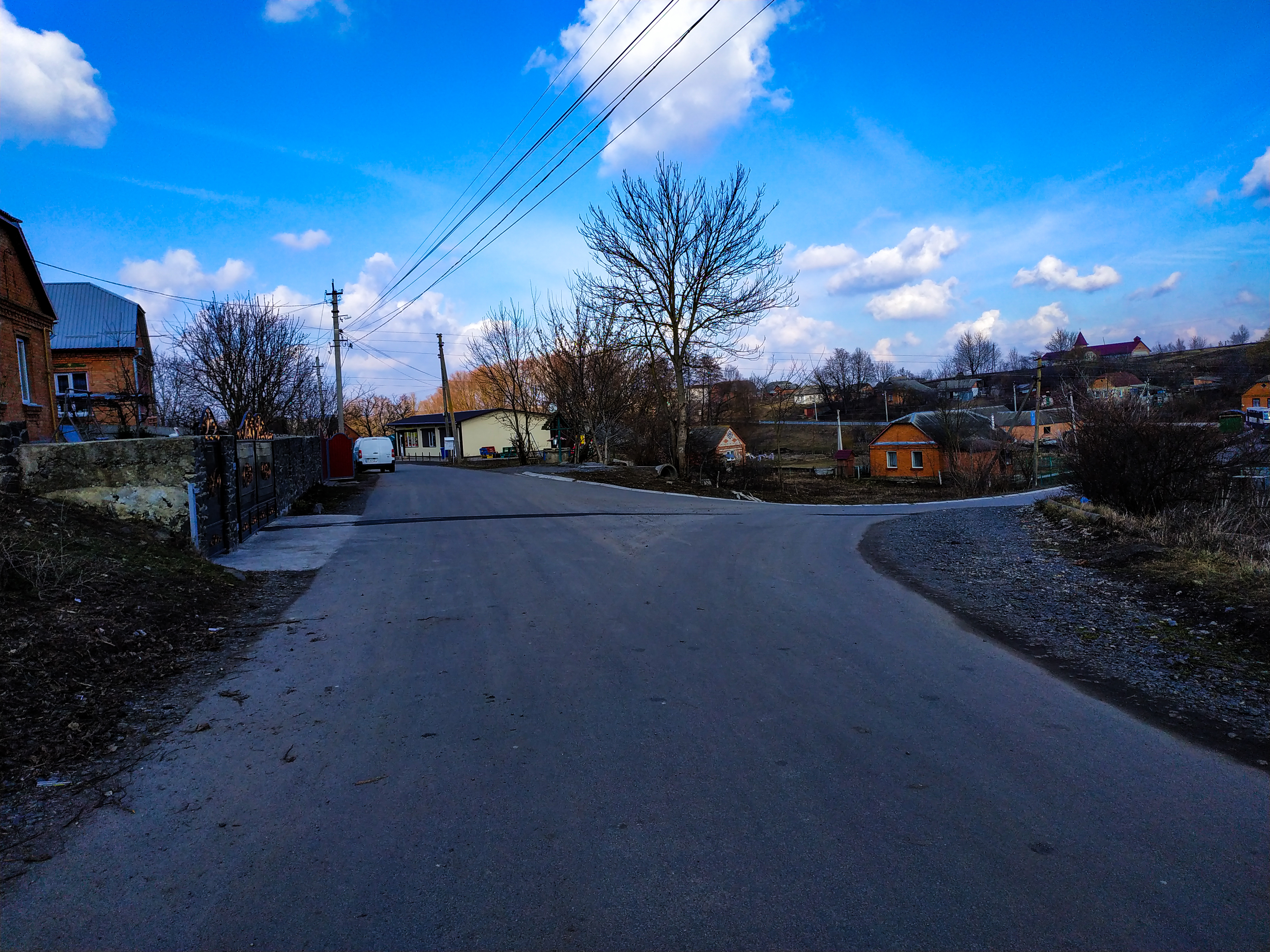 вул. Садова